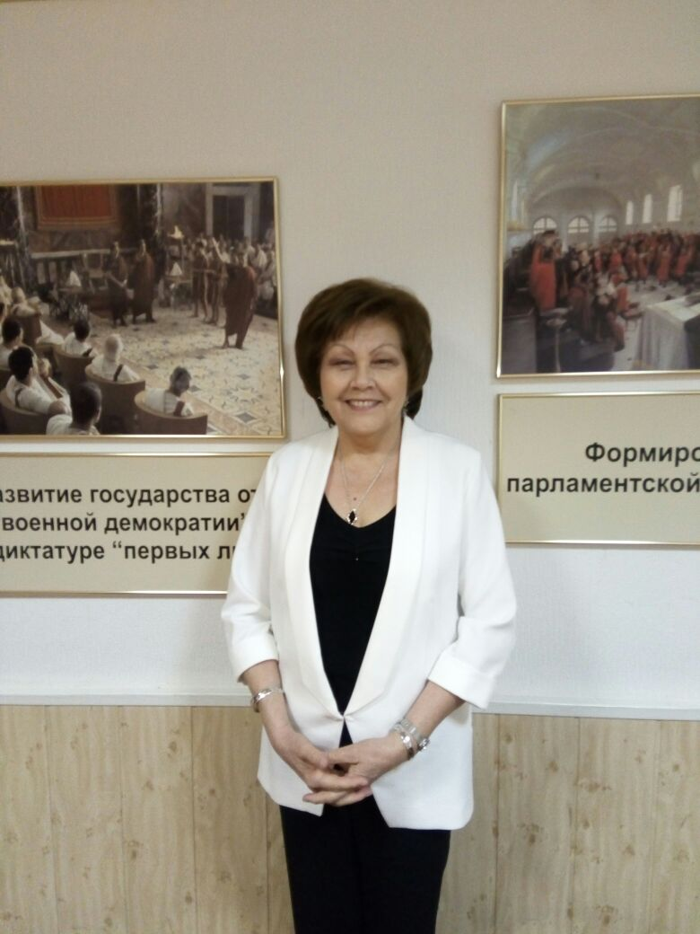 Роза Гафаровна Буканова. Доктор исторических наук, профессор.